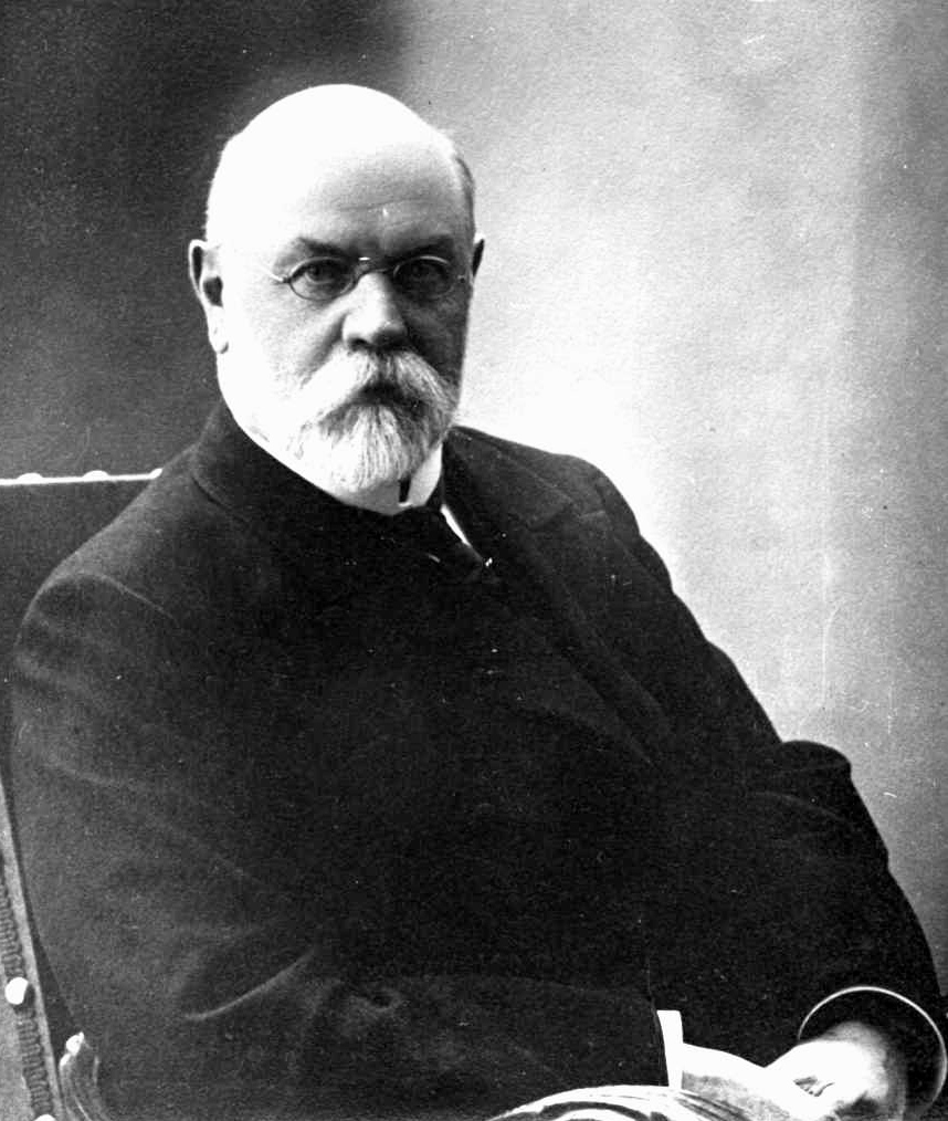 Покровский Владимир Корнильевич (11 июля 1843 — 19 сентября 1913) — один из крупнейших челябинских предпринимателей начала ХХ века, общественный деятель и меценат; неоднократно избирался депутатом Челябинской городской думы, пытался организовать в Челябинске отдел оренбургского Союза законности и порядка.